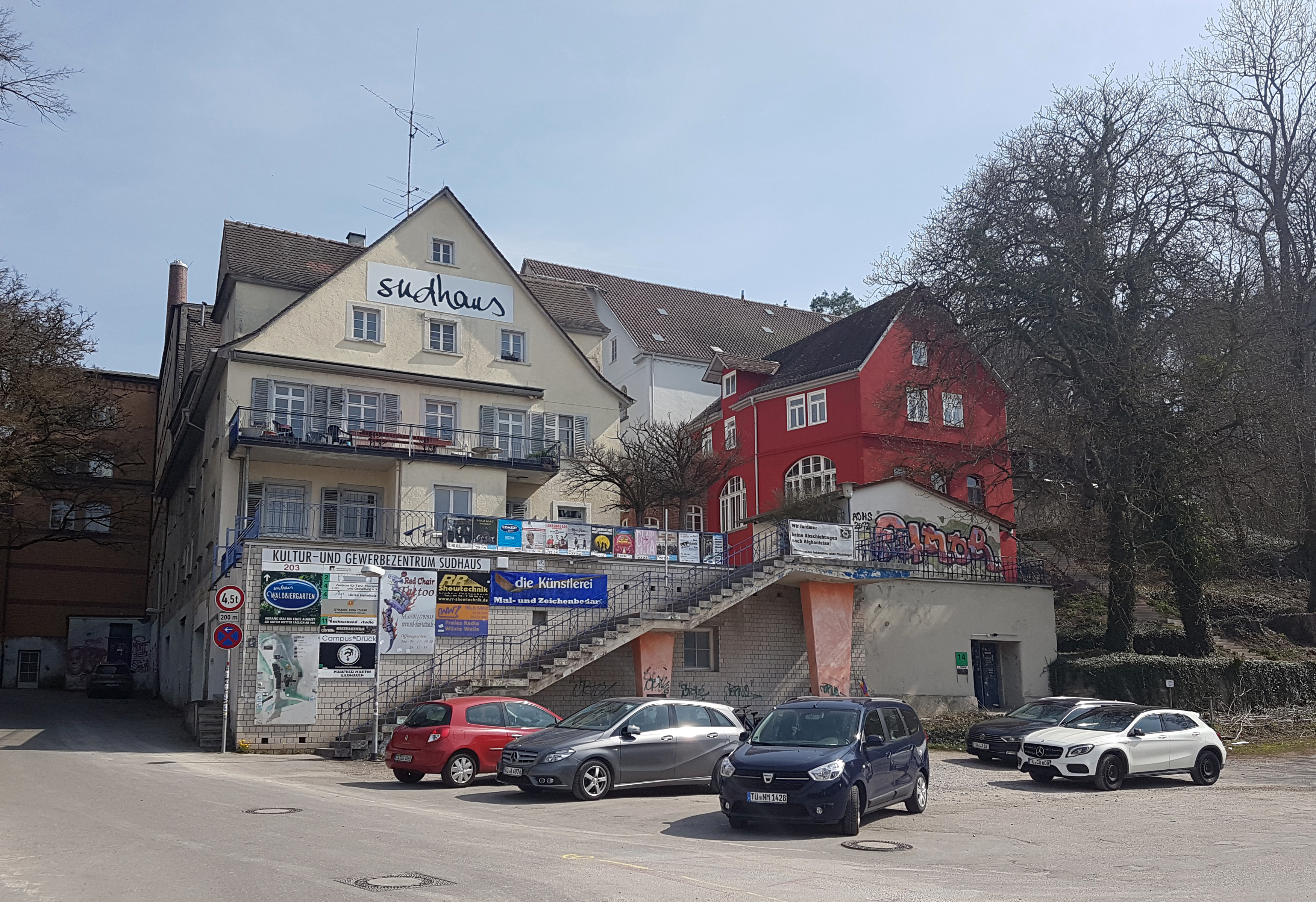 Das Sudhaus in Tübingen im April 2019